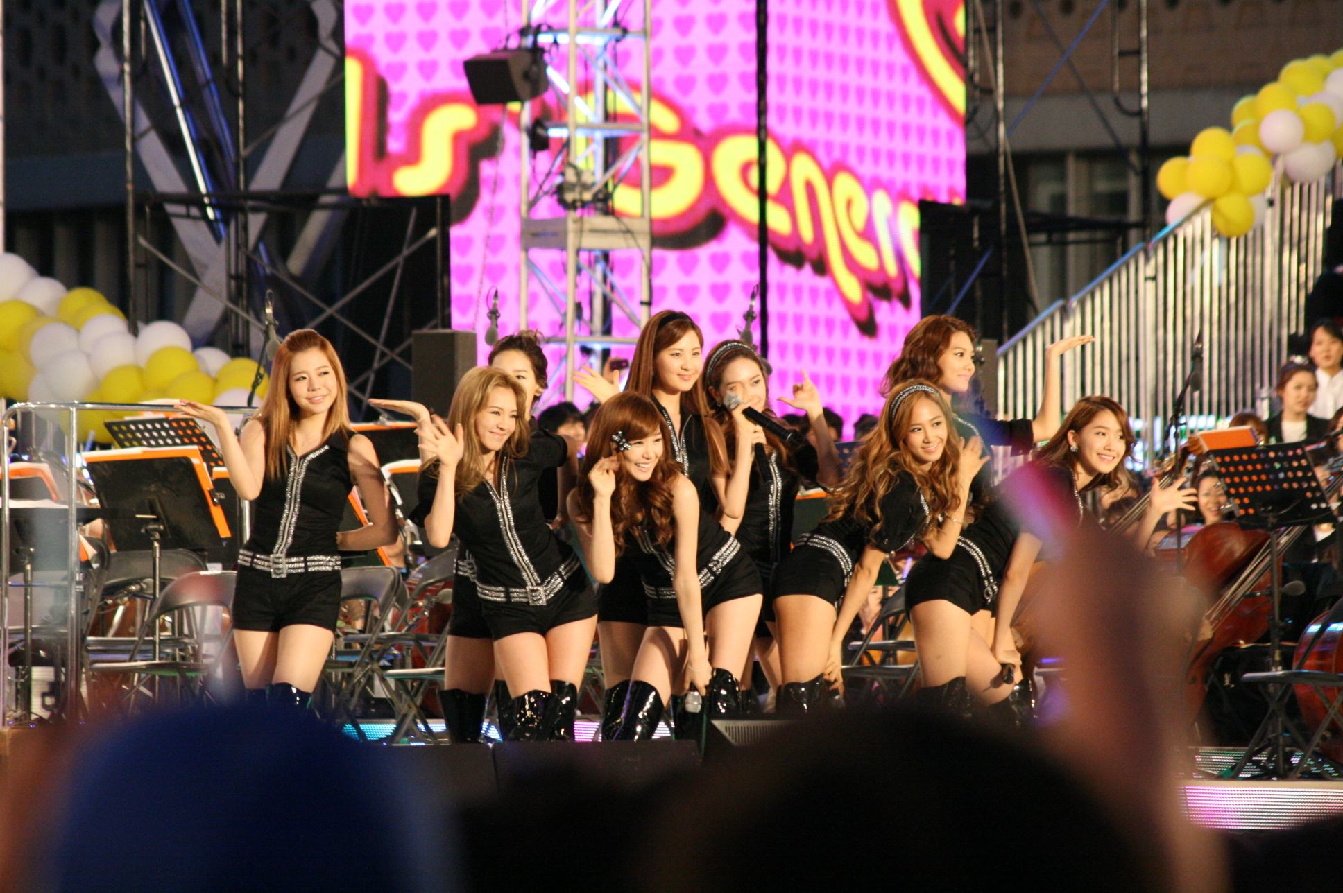 2011년 5월 14일 2018 평창동계올림픽 유치기원 국민대합창에서 공연 중의 소녀시대.